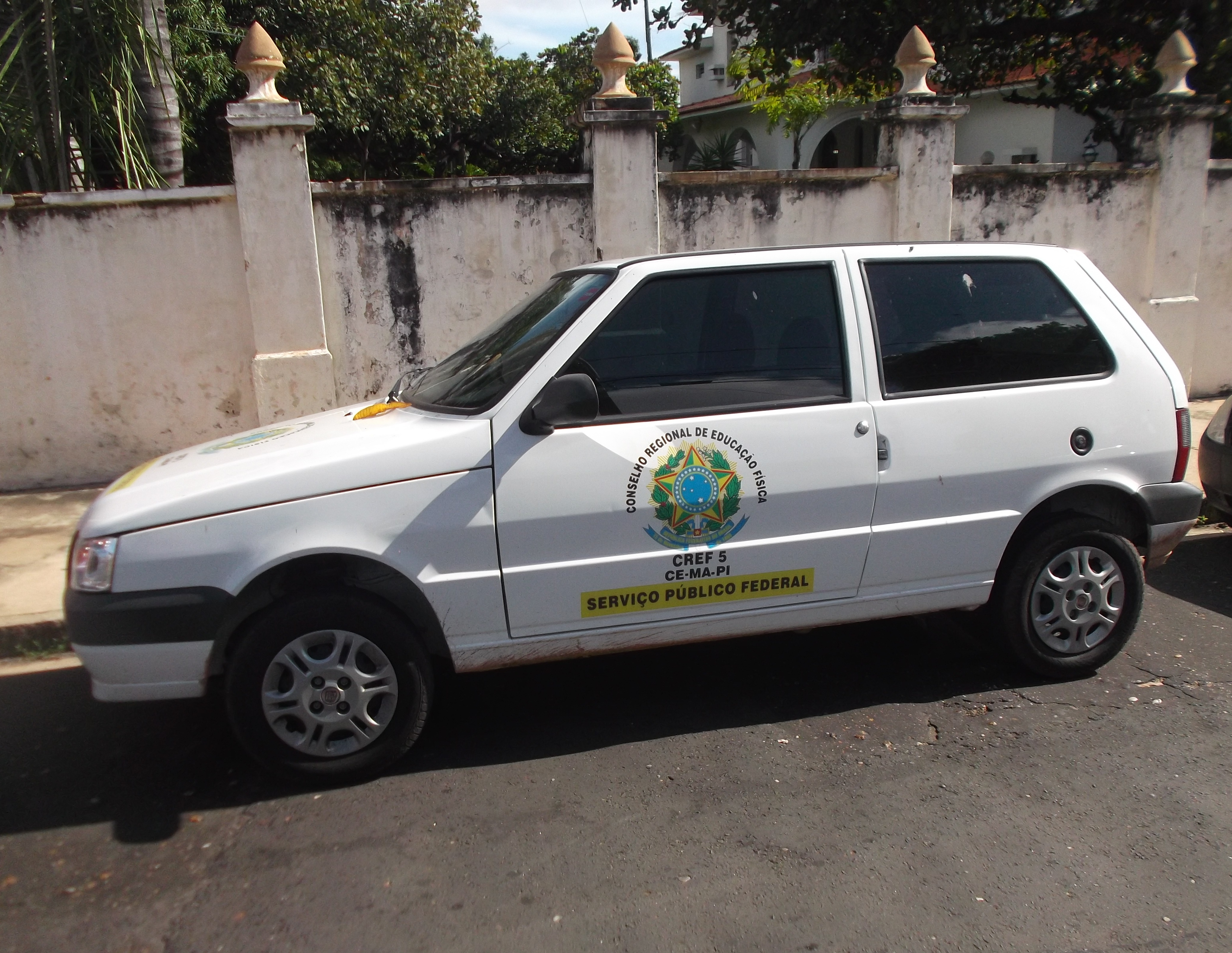 Veículo do Conselho Regional de Educação Física - CREF5, jurusdição PI-CE-MA.